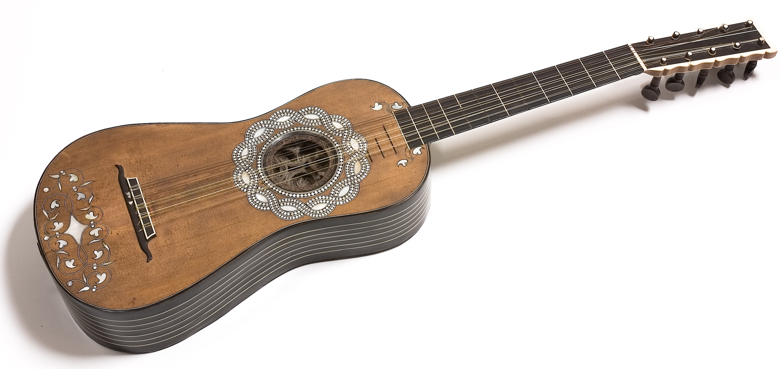 Gitarr, tillverkare Matteo Seelos, före 1653. Foto Olav Nyhus. Ingår i Musik- och teatermuseets instrumentsamling.